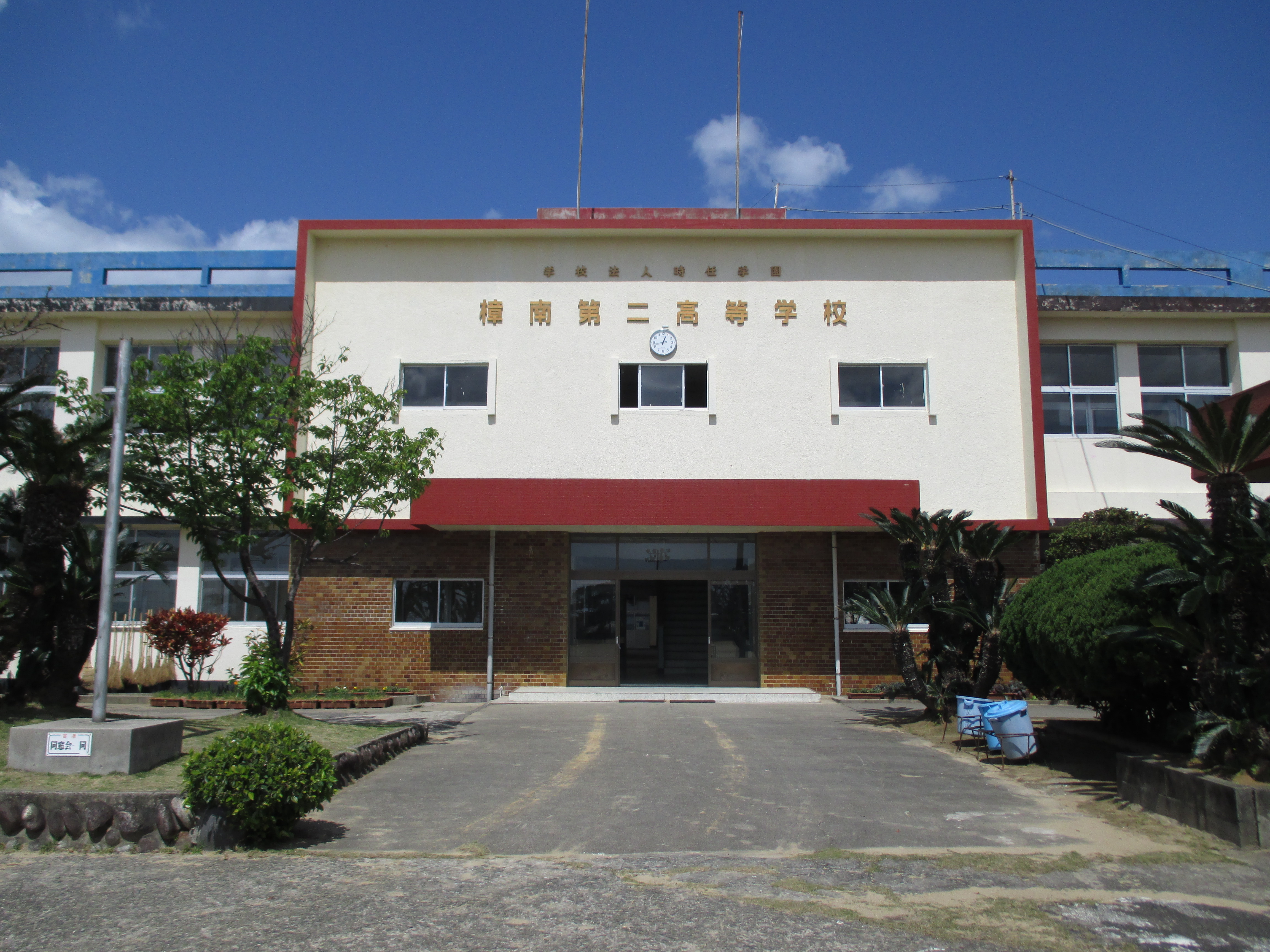 正面玄関です